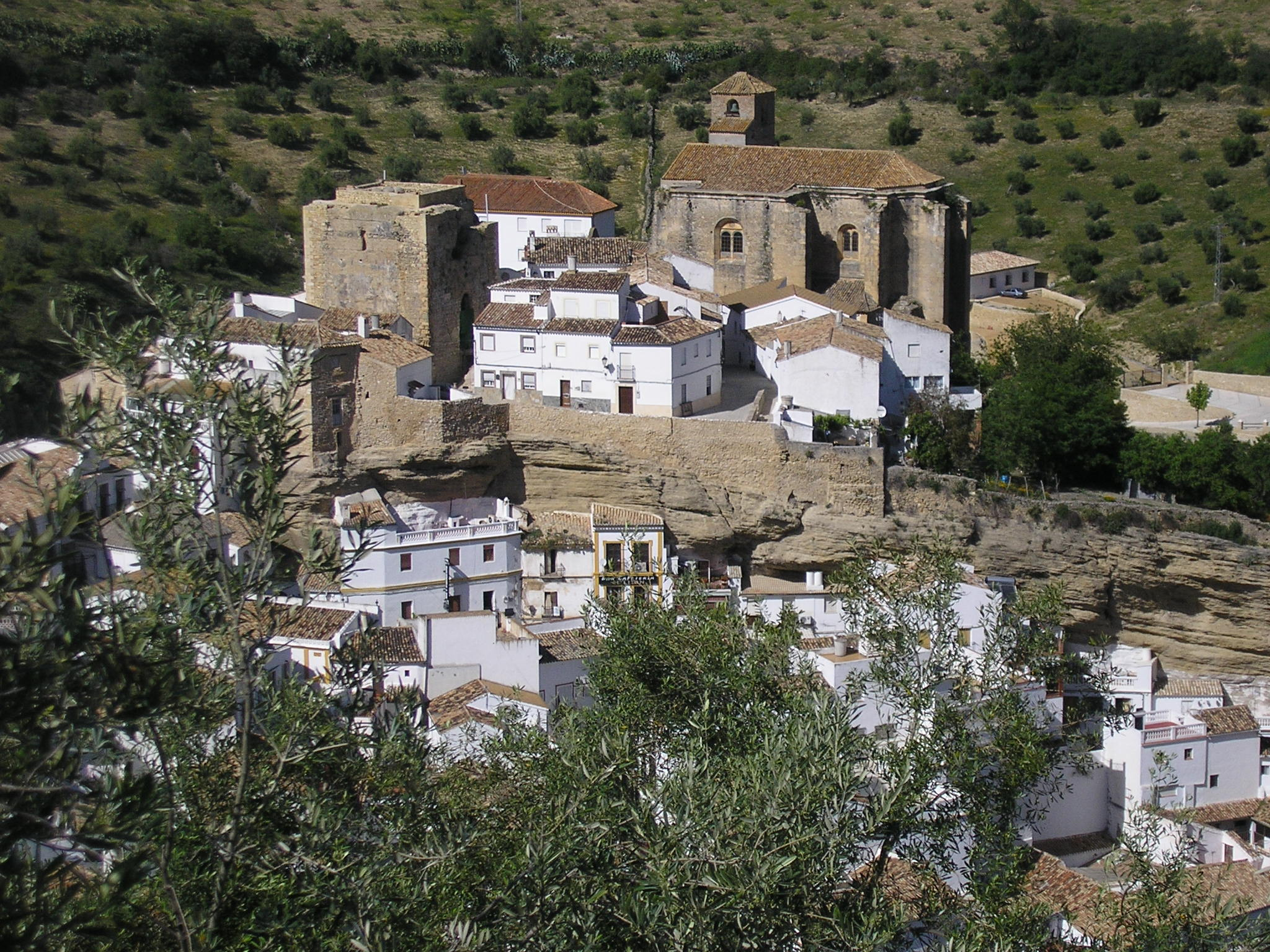 Vista de Setenil de las Bodegas, Andalucía, España.